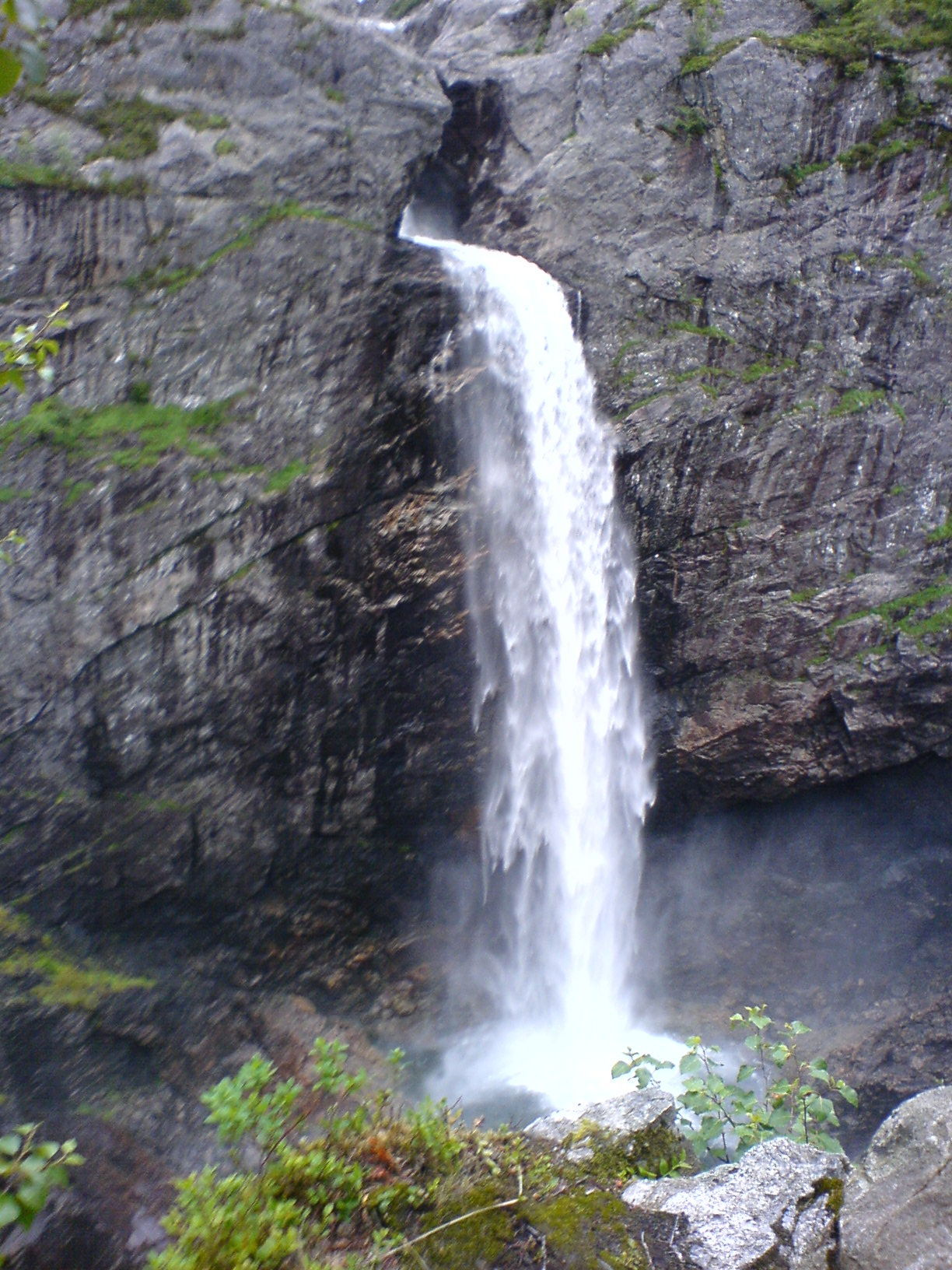 Månafossen